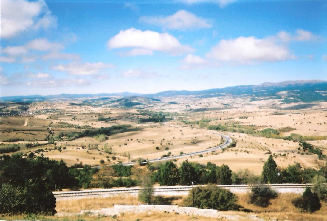 Dumlupınar Şehitliği